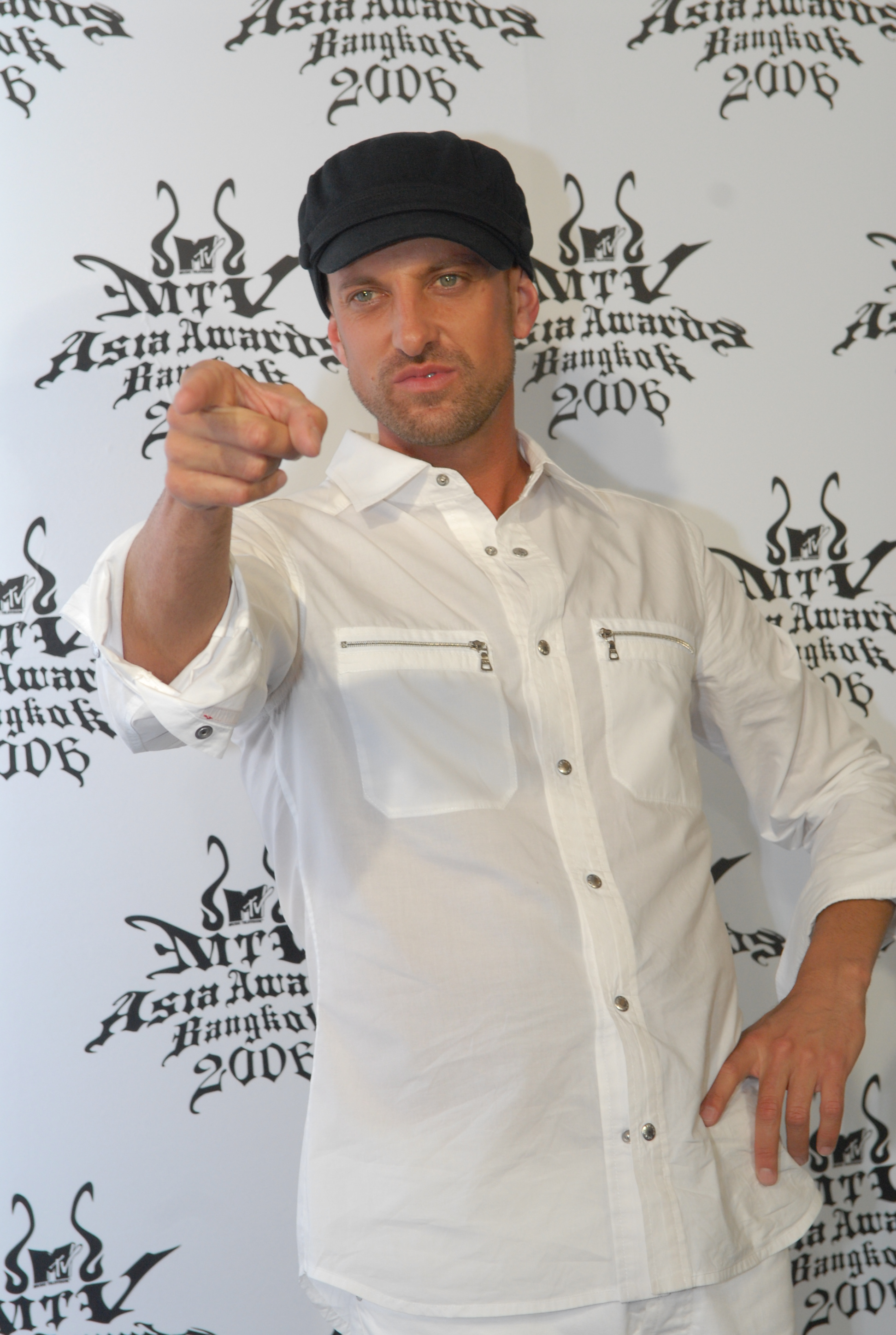 Daniel Powter at MTV Asia Awards 2006,Bangkok, Thailand